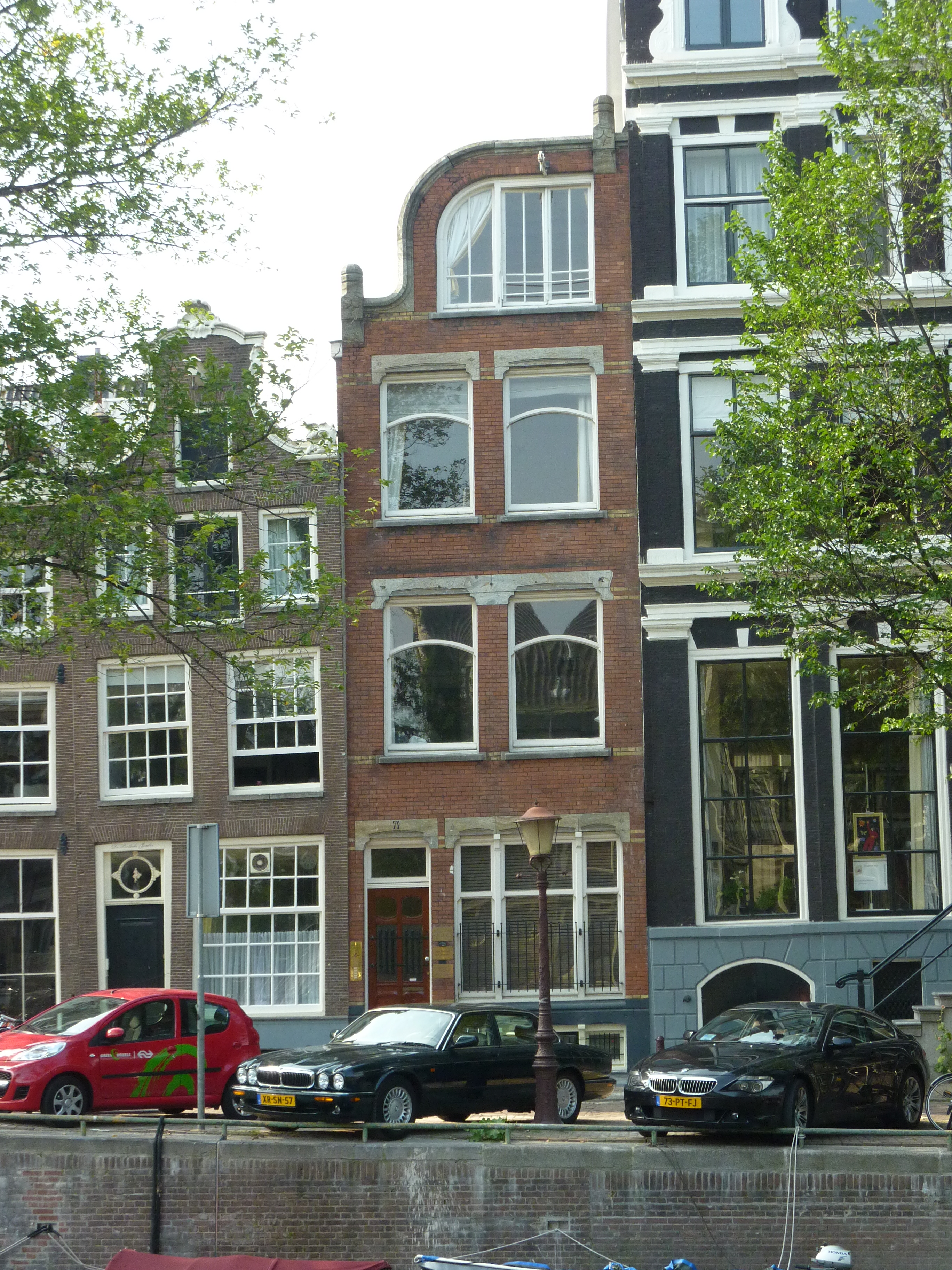 Amsterdam, Herengracht 74